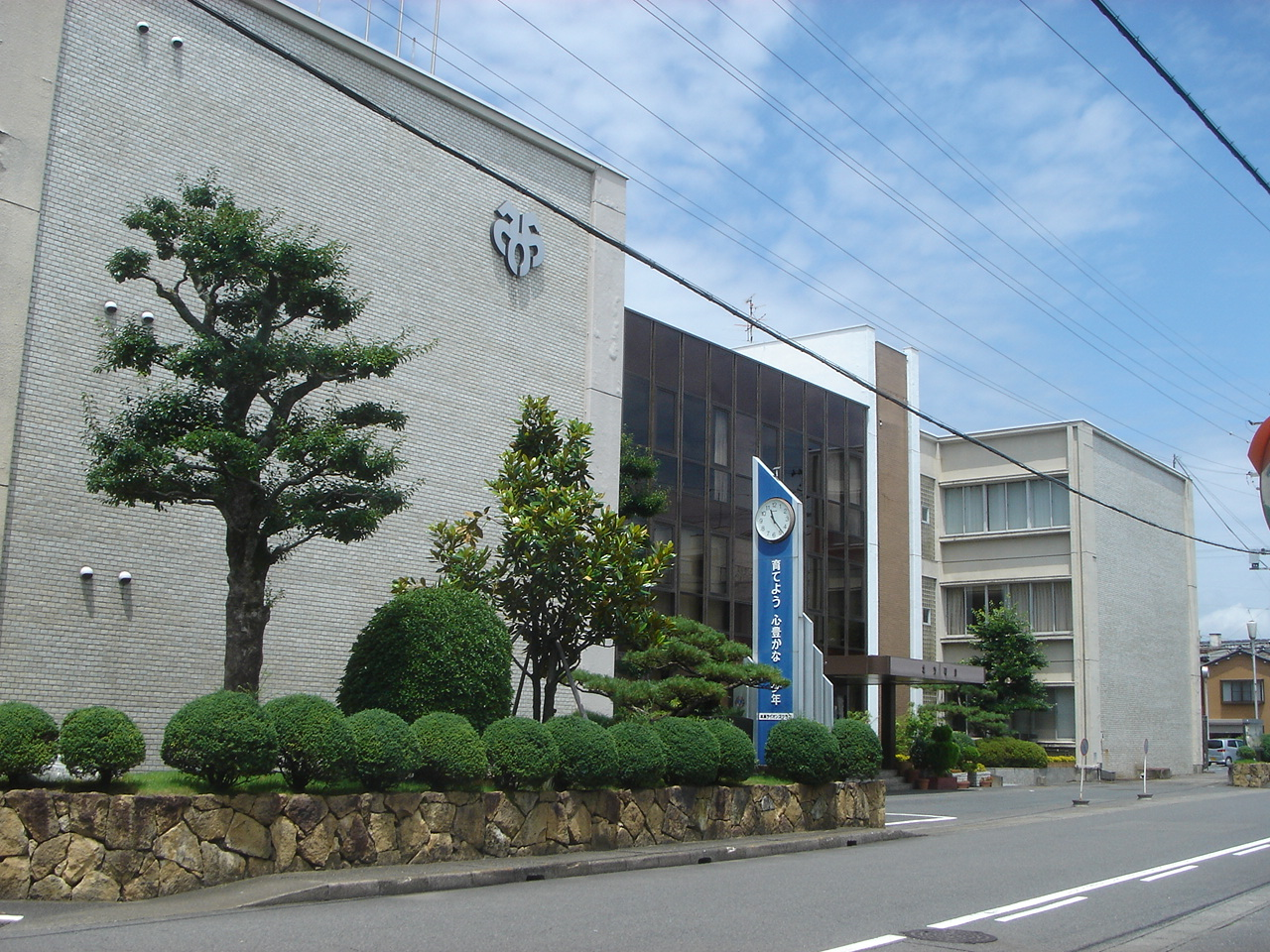 Kitagata Town Office(北方町役場),Kitagata,Gifu,Japan(岐阜県北方町)で撮影